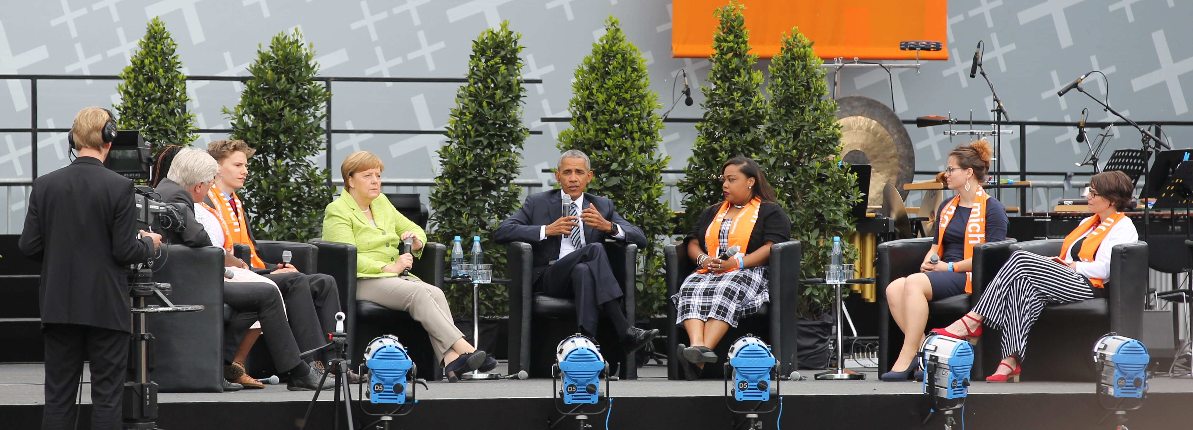 Angela Merkel und Barack Obama während einer Gesprächsrunde am Brandenburger Tor anlässlich des Deutschen Evangelischen Kirchentags 2017 in Berlin und Wittenberg